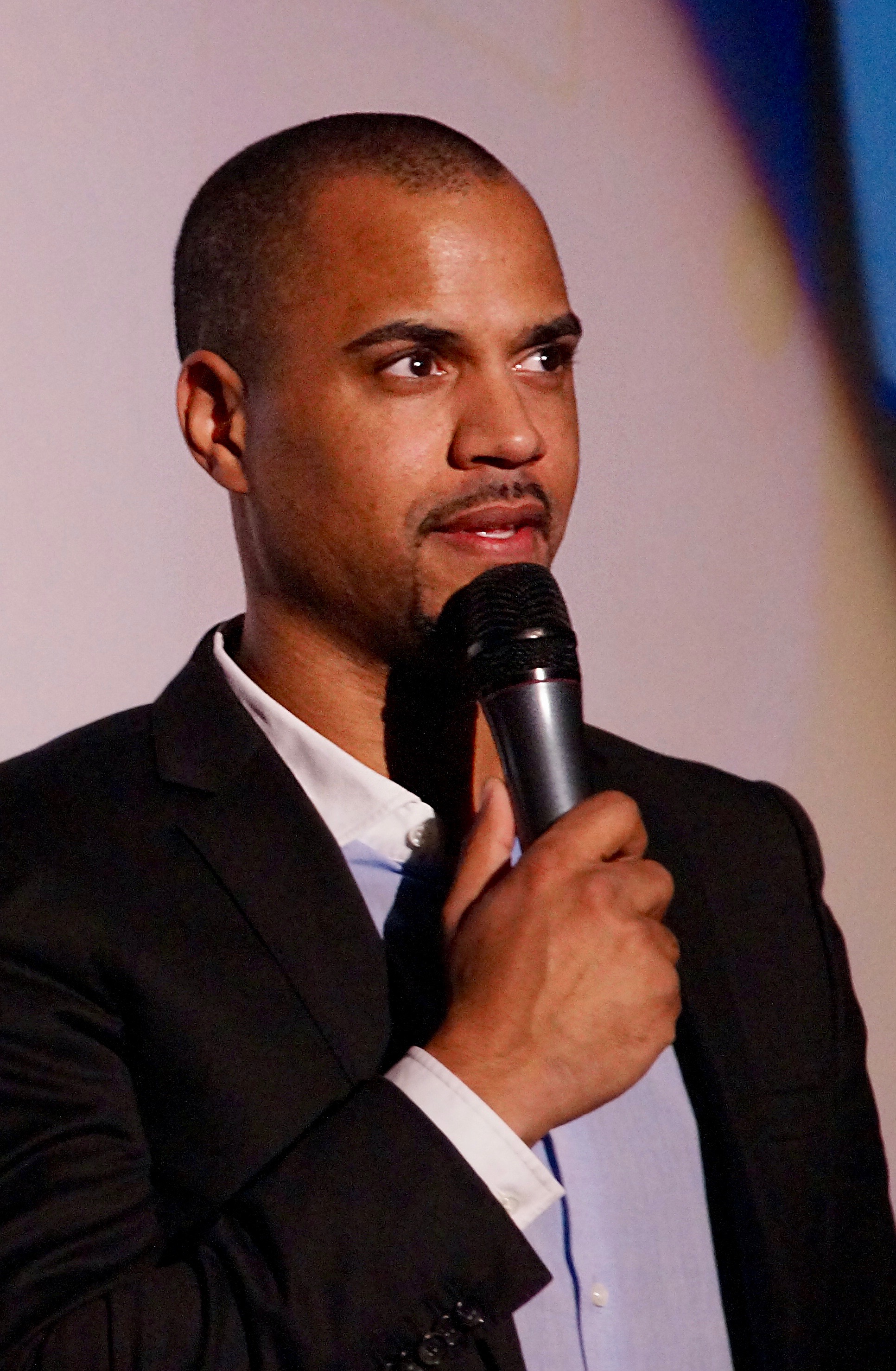 Patrice Bouédibéla bei der Europa-Premiere von dem neuen Animationsfilm "SING", am 27.11.2016 im Kölner Cinedom.